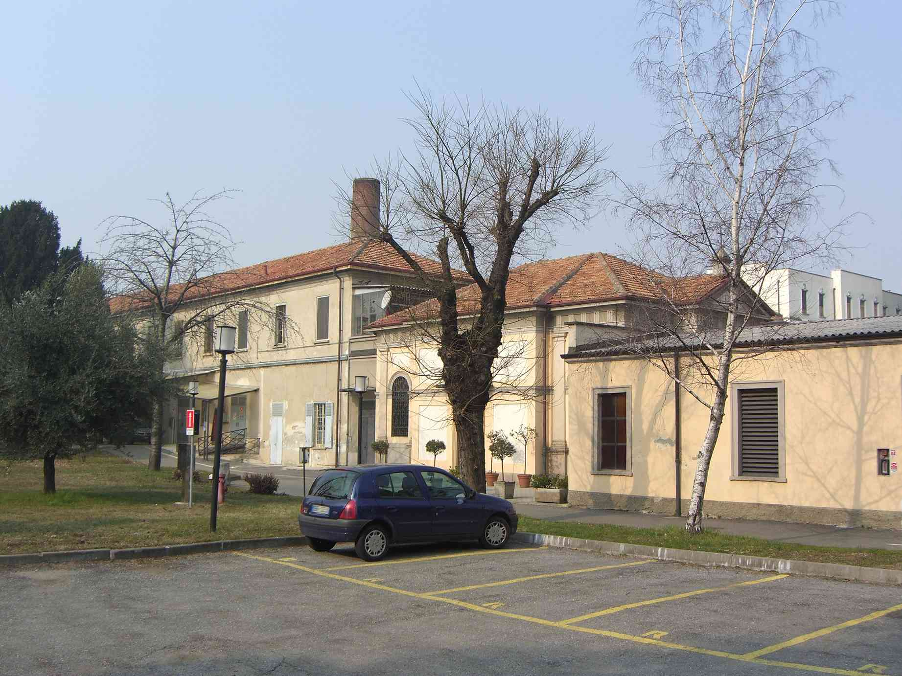 Chiesa di Sancto Gerhardo annessa al vecchio Ospedale San Gerardo ex Umberto I – vista dal cortile dell'ospedale adiacente all'edificio dei servizi - a sinistra -caratterizzato dalla grossa ciminiera in mattoni - 1896 architetto Ercole Balossi-Merlo